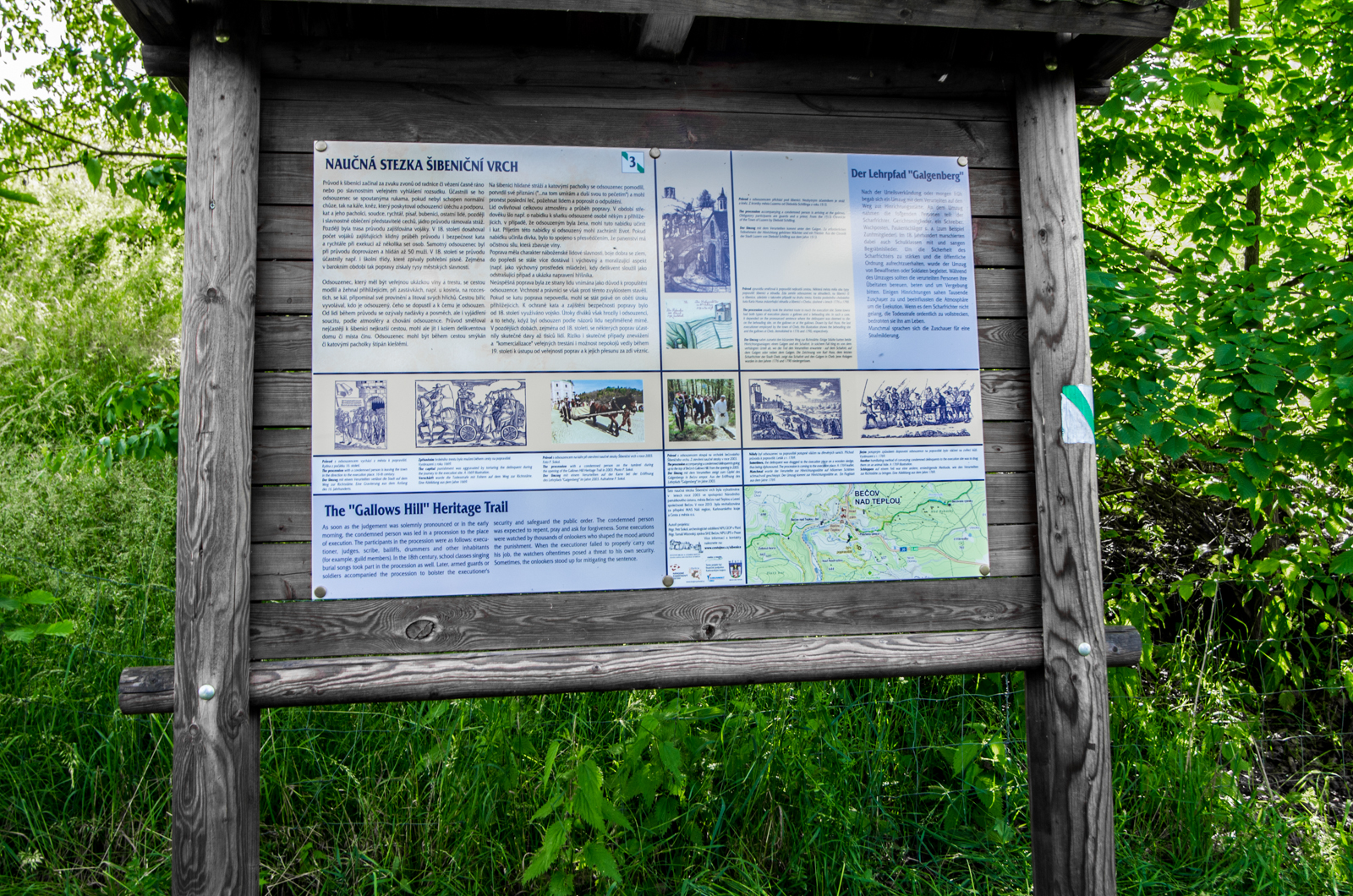 Bečov nad Teplou, informační tabule na naučné stezce Šibeniční vrch, Slavkovský les, okres Karlovy Vary